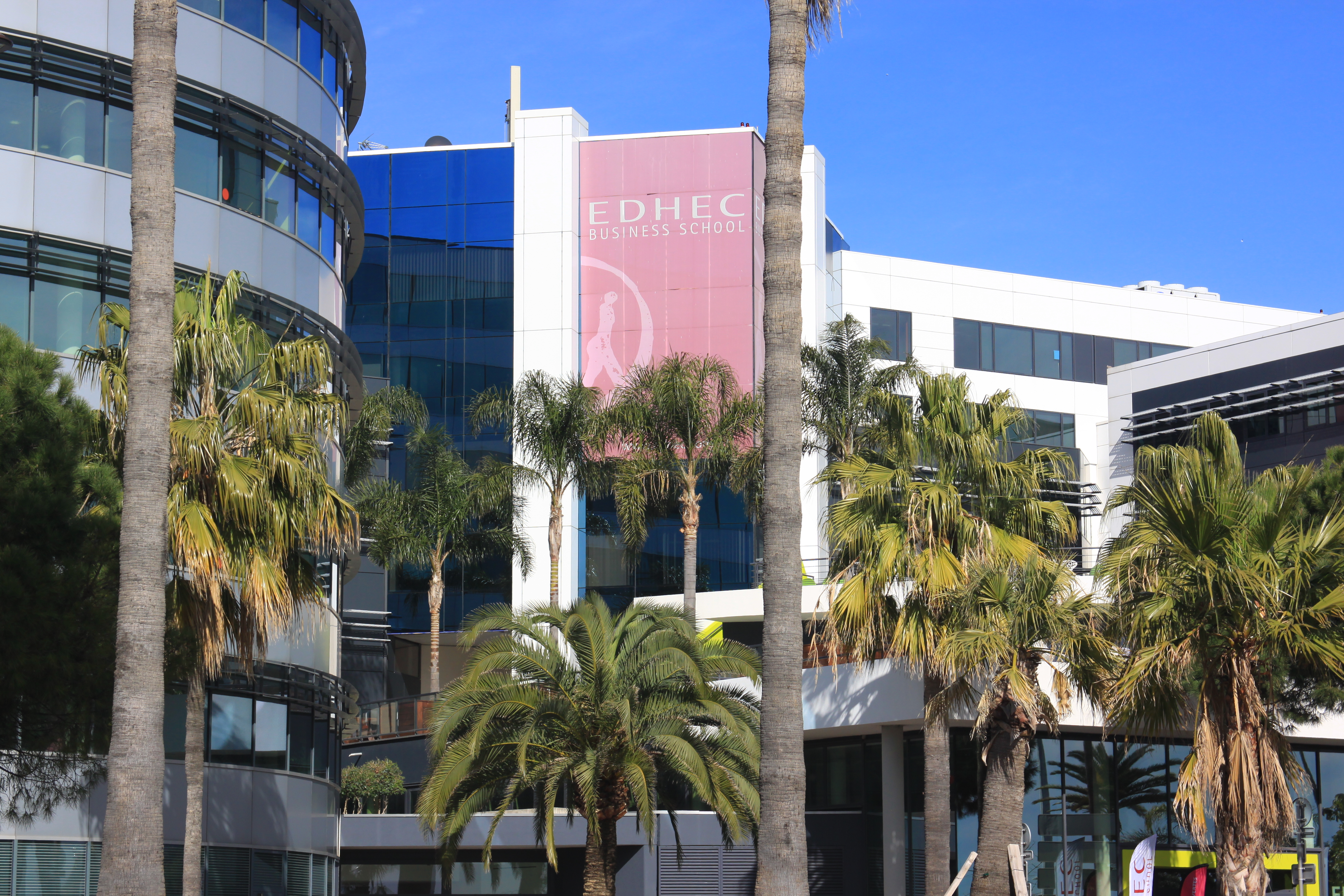 Ecole internationale EDHEC Business School de Nice, située sur la Promenade des Anglais, près du quartier d'Affaire de l'Arénas.